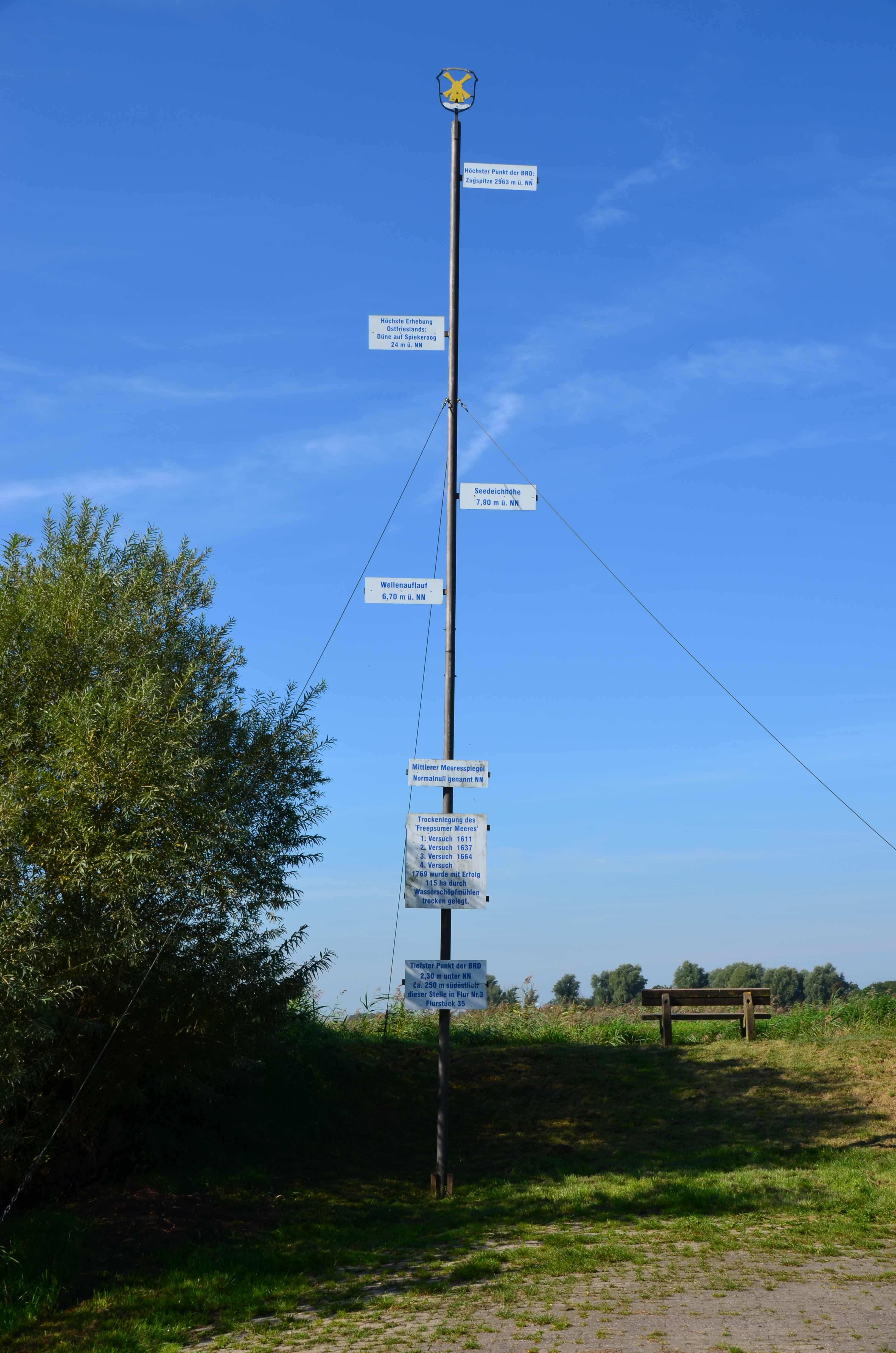 Markierung am ehemaligen Freepsumer Meer mit dem Hinweis auf die (zweit-) tiefste Landstelle Deutschlands